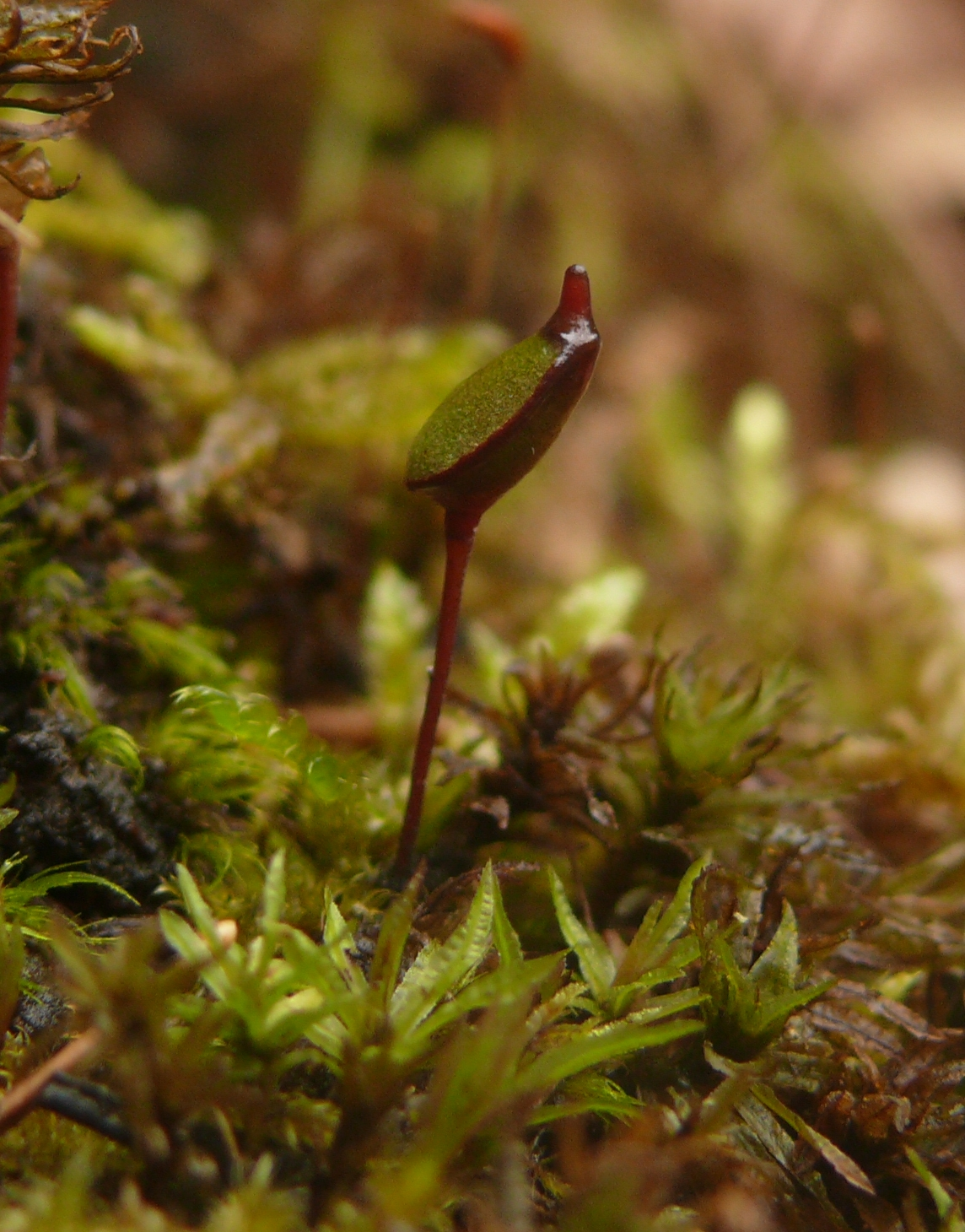 Buxbaumia aphylla, Sandstein-Odenwald